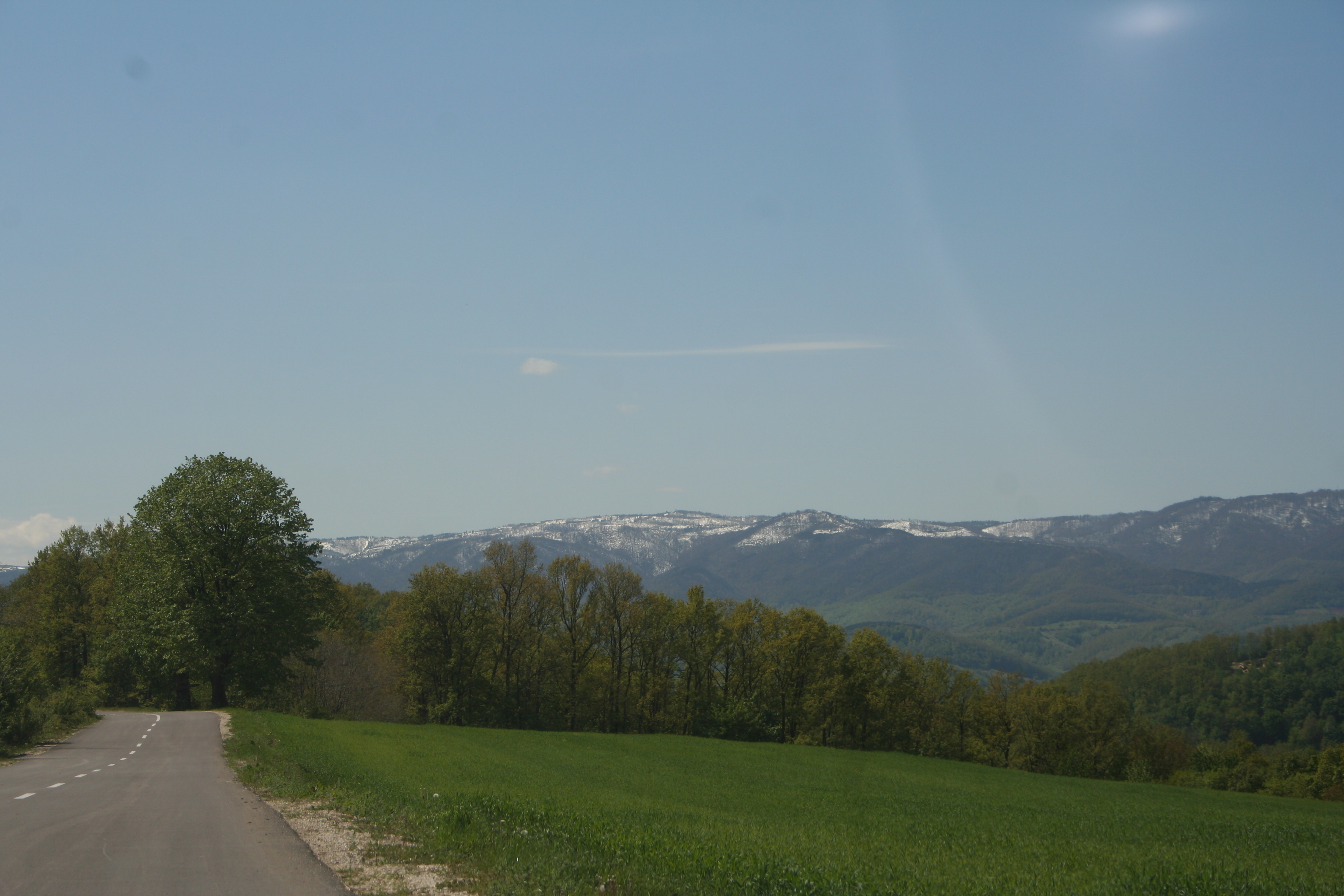 Pogled iz Struganika prema Valjevskim planinama